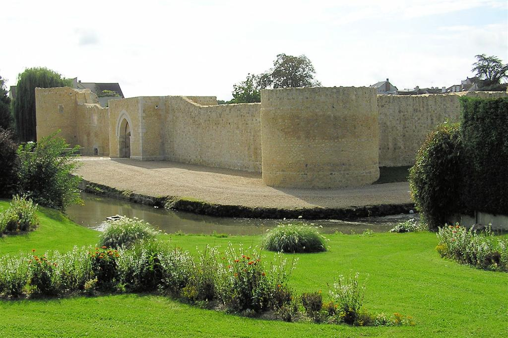 septembre 2006 BRUNNER Emmanuel